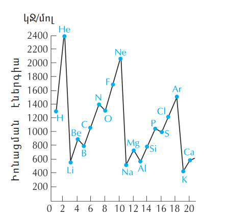 Իոնացման էներգիա